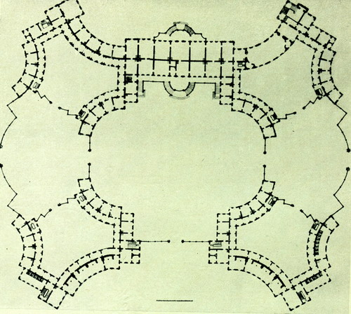 План царского палаца: план нездійсненої споруди